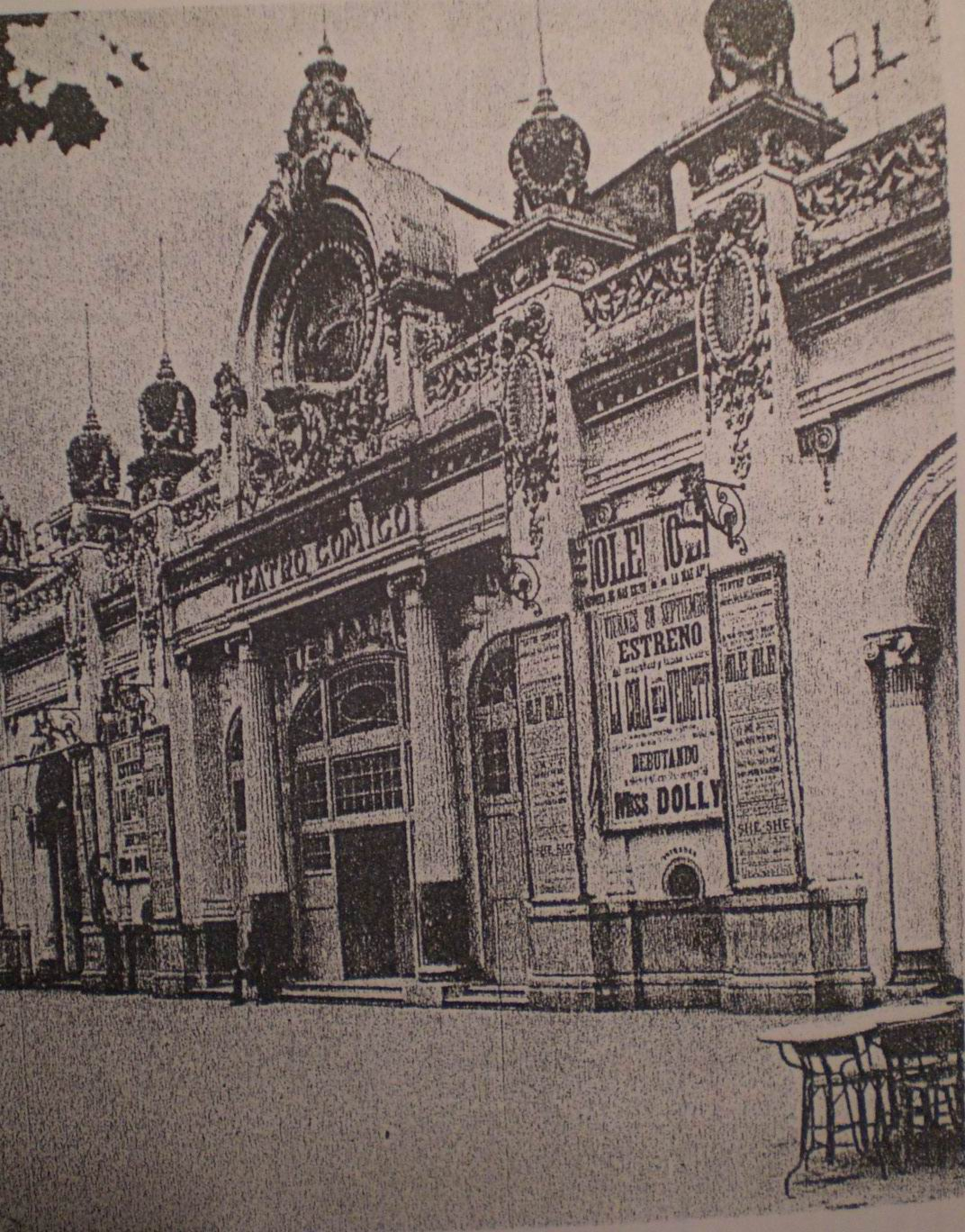 Teatre Comic al C/ Tapioles (Barcelona-Catalunya), obra de Joaquim Raspall de 1906 (desaparegut).